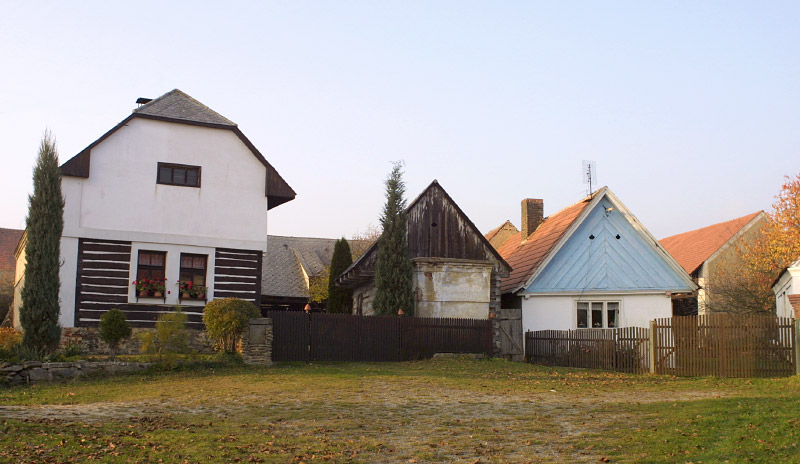 Domky v Holovousích.